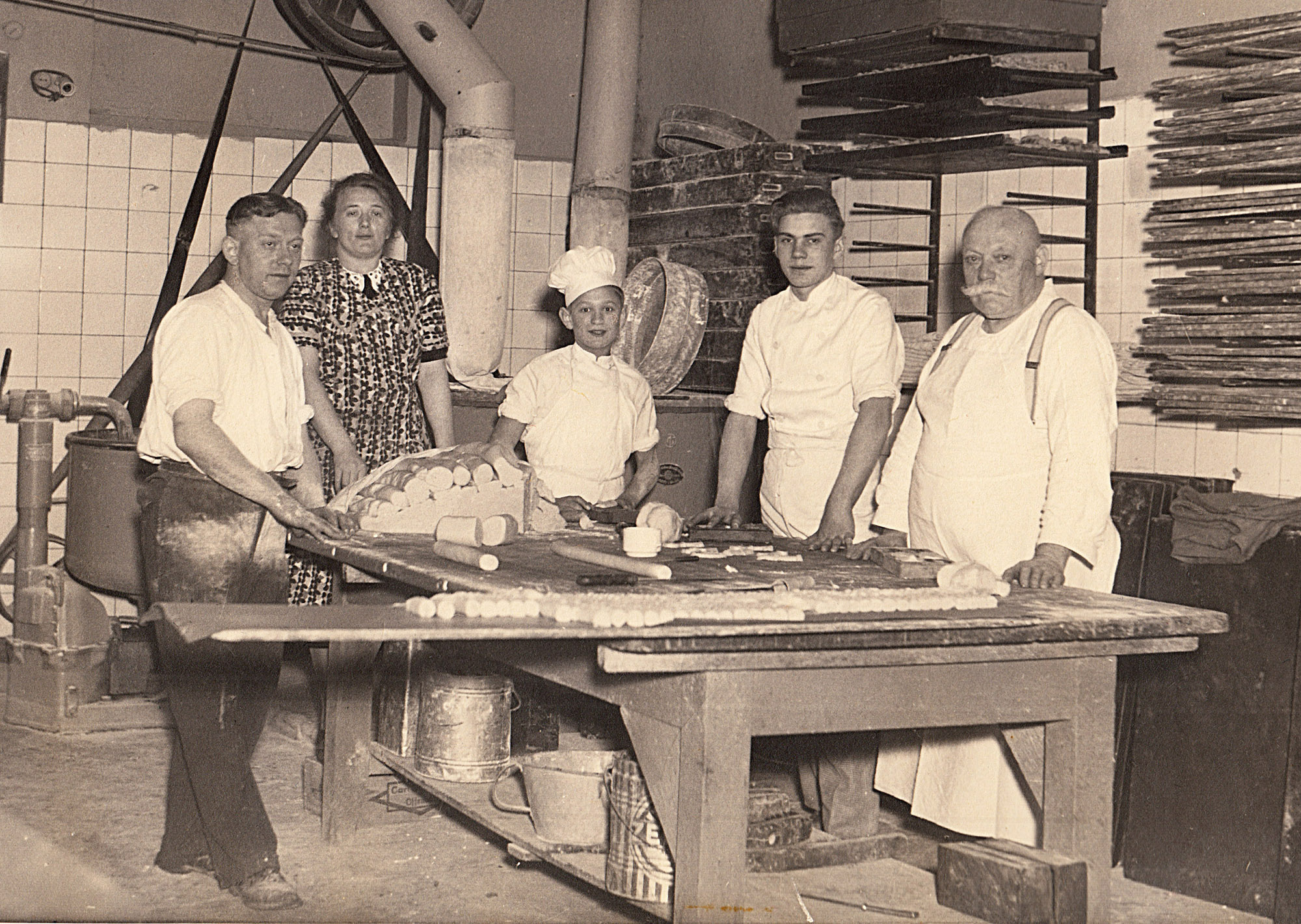 Backstube der Bäckerei Kronenberg in Schwelm, Potthoffstraße, zur Zeit der Weihnachtsbäckerei 1941. Zweite von links Martha Kronenberg, ganz rechts ihr Vater Johannes Kronenberg.